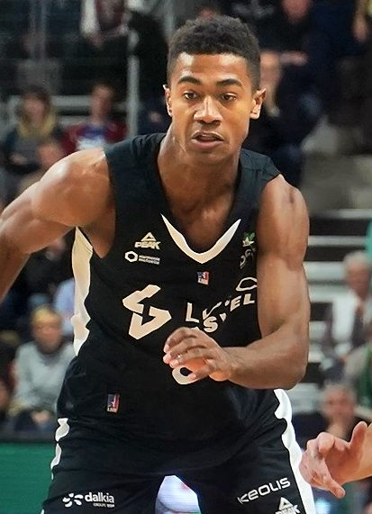 ODN07596